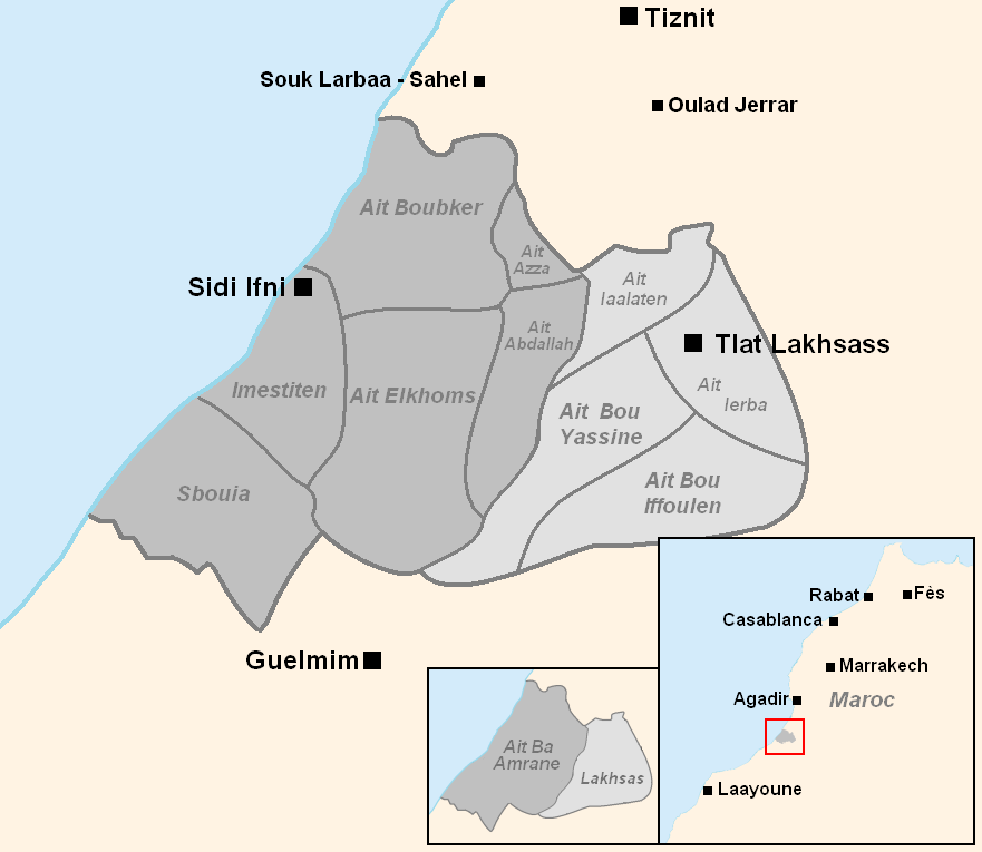 Carte des clans de la tribu Ait Baamrane.Inspirée de la carte de localisation des Ait Ba'amran dans l'article : Romain Simenel, « L'origine est aux frontières - Espace, histoire et jihad chez les Aït Ba'amran du Sud marocain », dans : Transcontinentales, n.3 (2006). (Article en ligne : des clans de la tribu Lakhsass.Selon Mohamed Alahyane, « Études anthropologiques en Anti-Atlas occidental : Lakhsas », dans Études de l'IRCAM, n.4 (2004). (Article en ligne